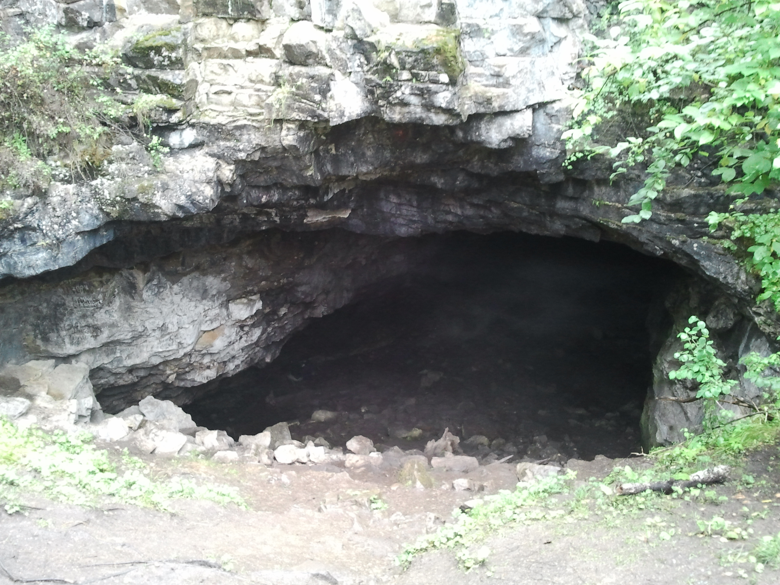 Кургазакская пещера у побережья реки Ай